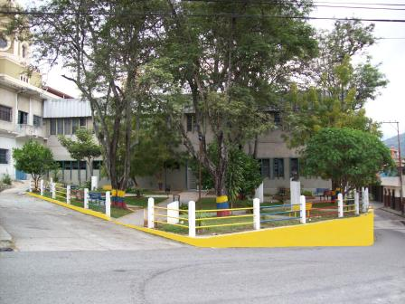 Entrada posterior al Centro Cultural Elbano Mendez Osuna, homenaje a Claudio Vivas, Gian Domenico Puliti y demás escritores Tovareños